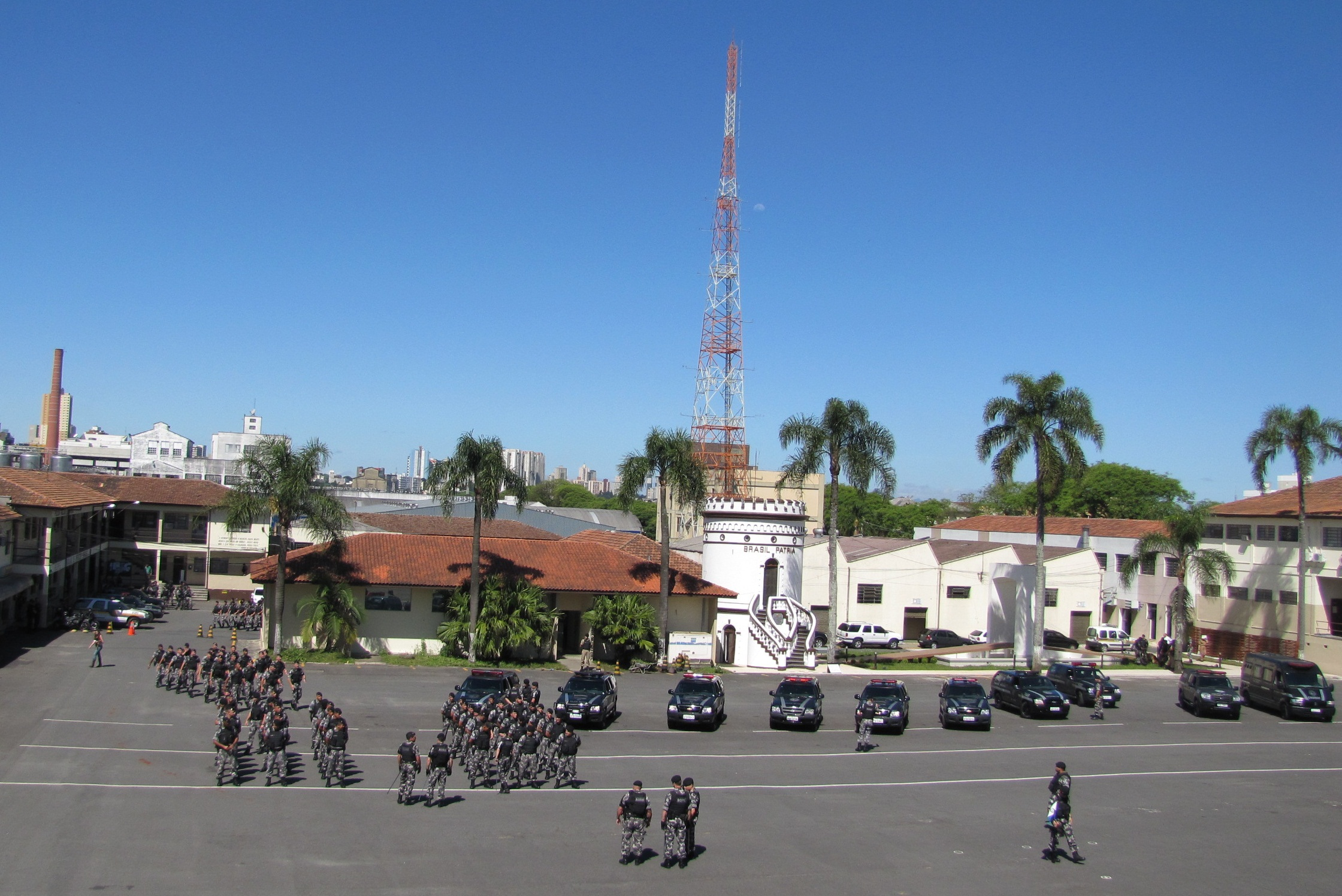 Batalhão de Operações Especiais da Polícia Militar do Paraná.